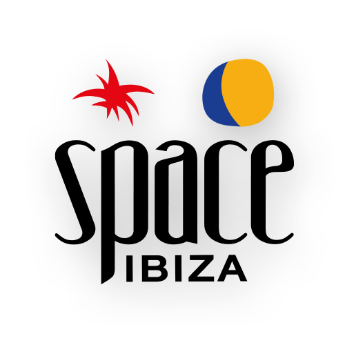 Logo SPace Ibiza 2015